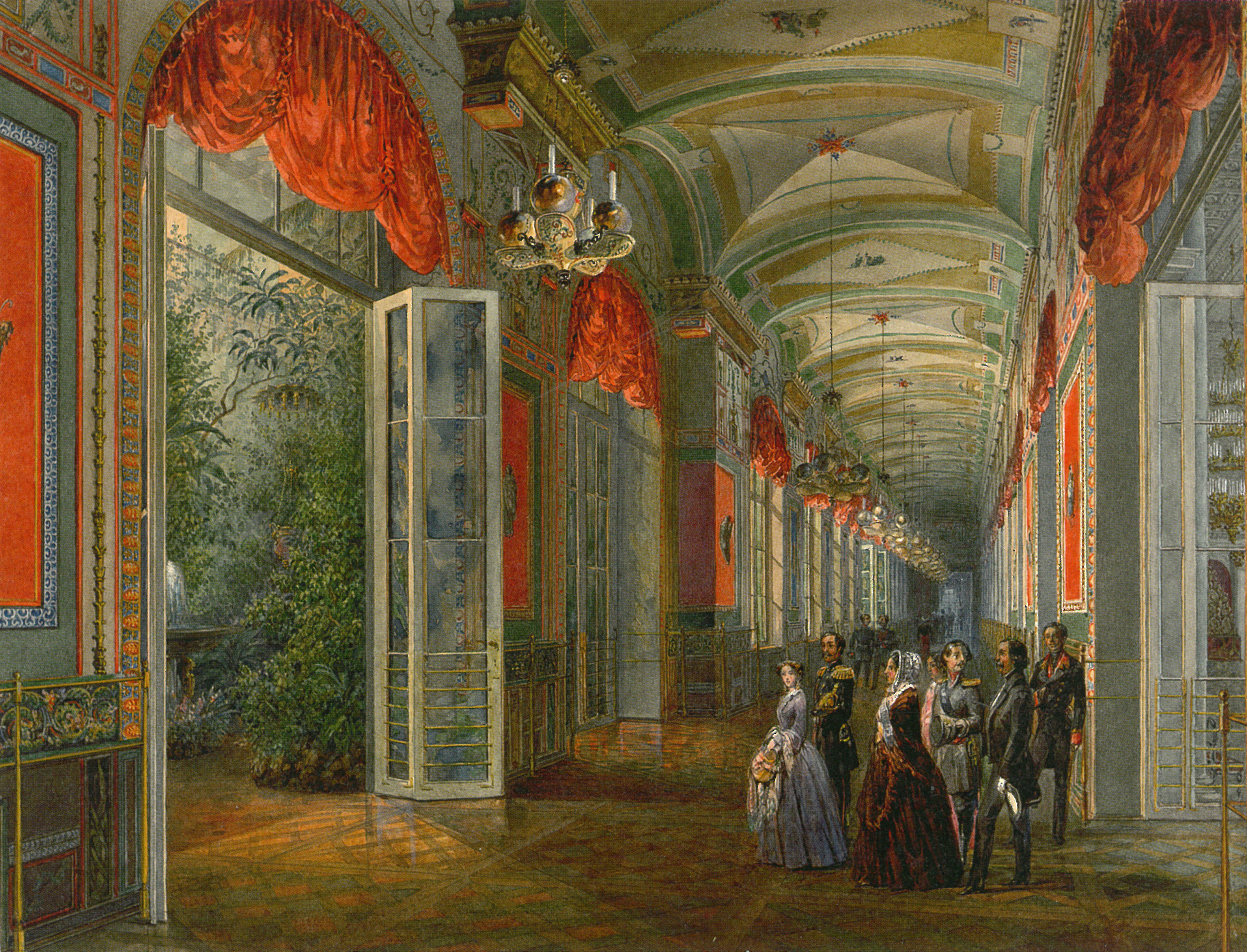 Помпейская галерея Зимнего дворца (не сохранилась, ныне Восточная галерея). Акварель Василия Семёновича Садовникова середины XIX века, Государственный Эрмитаж